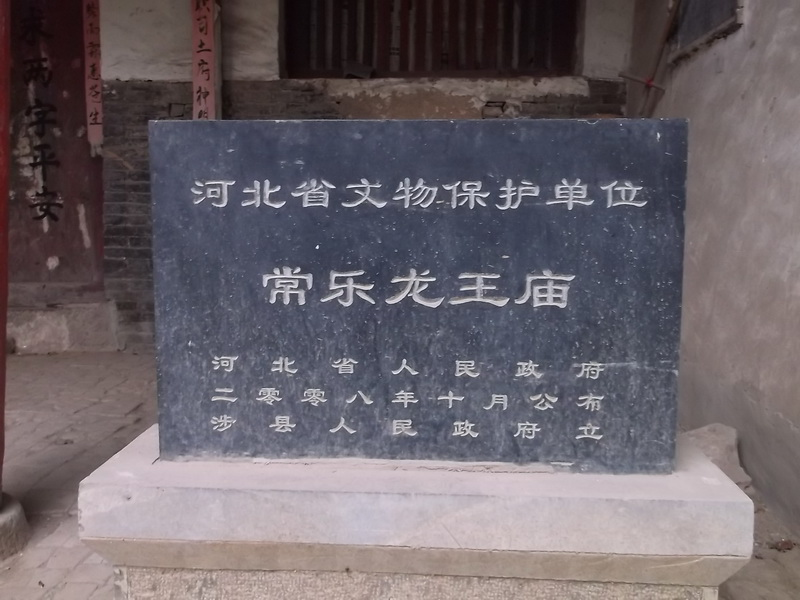 中文（中国大陆）: 常乐龙王庙正殿文物保护碑